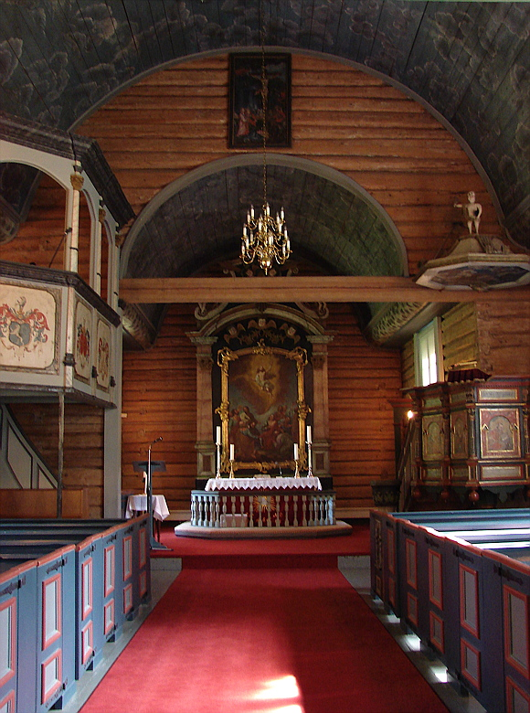 Koret i Solum Kirke, Telemark